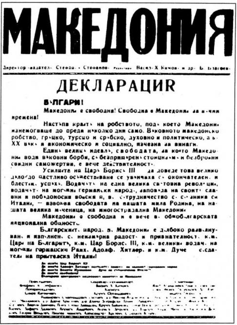 Вестник „Македония“.